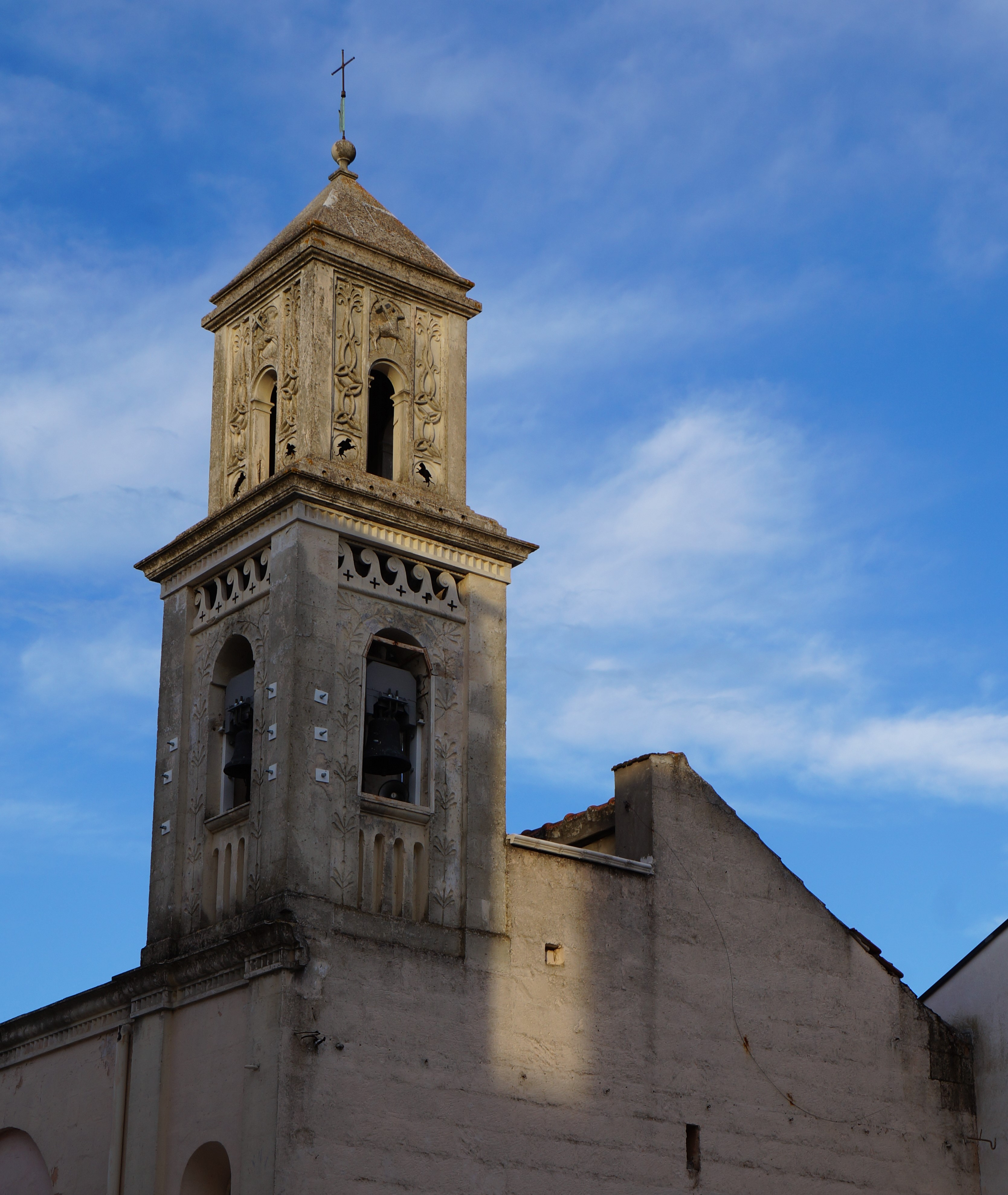 Raffigurato il campanile della parrocchia di Santa Lucia in Acquaviva delle Fonti e parte della facciata posteriore.